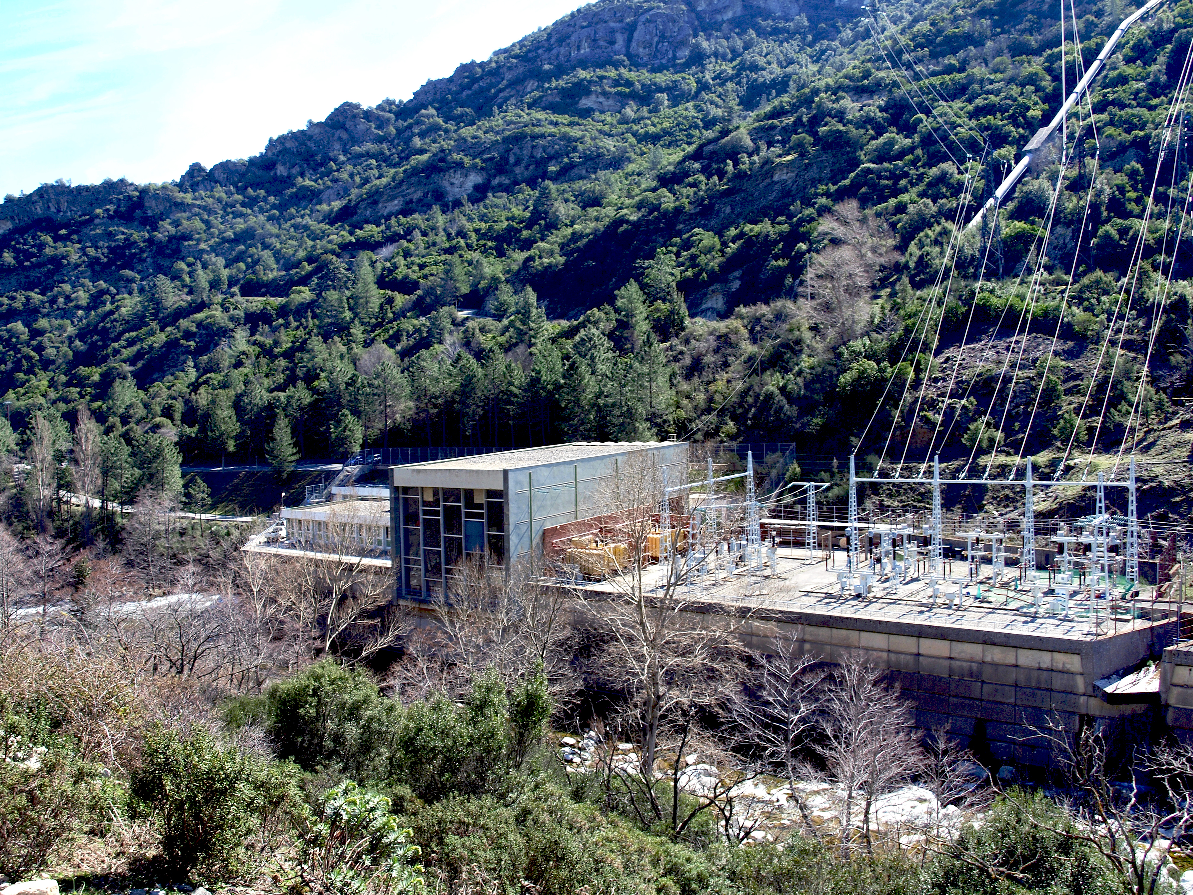 Castirla, Talcini (Haute-Corse) - La centrale électrique de Castirla au bord du Golo